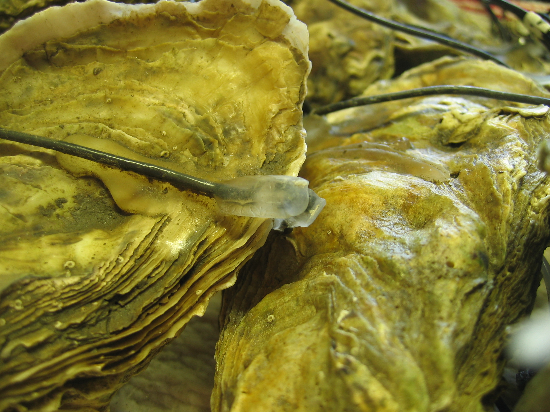 Huitre électrique Projet MolluSCAN eye